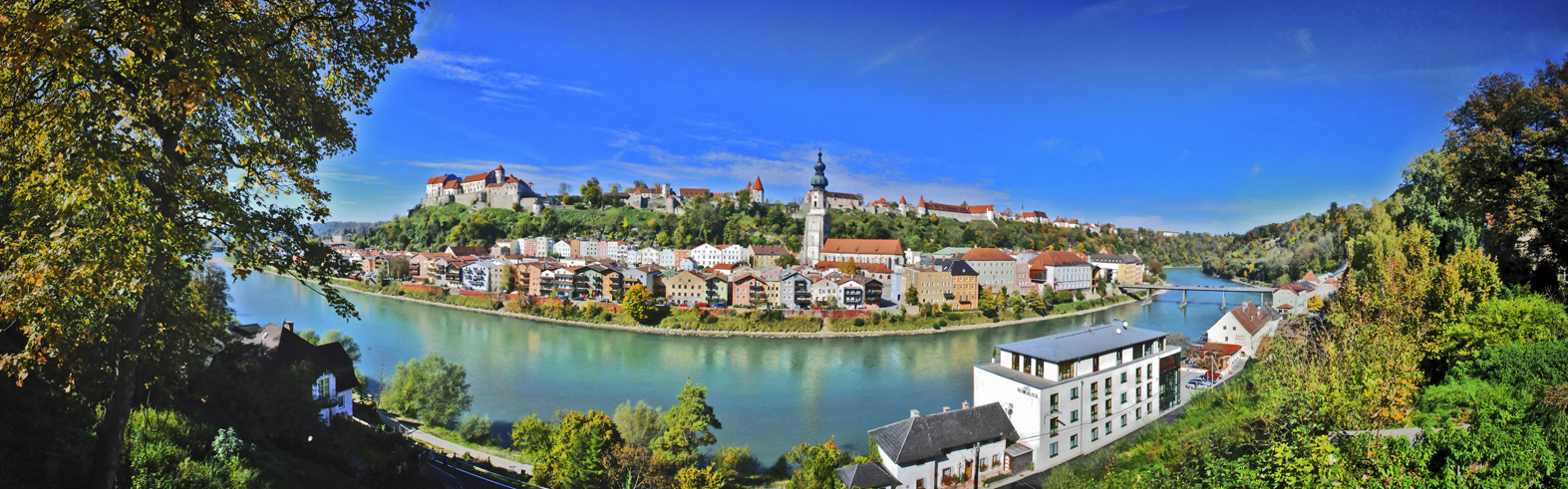 Mit 1051 Meter Länge, eine der längsten Burgen der Welt. 180 Grad Panorama von der österreichischen Seite.